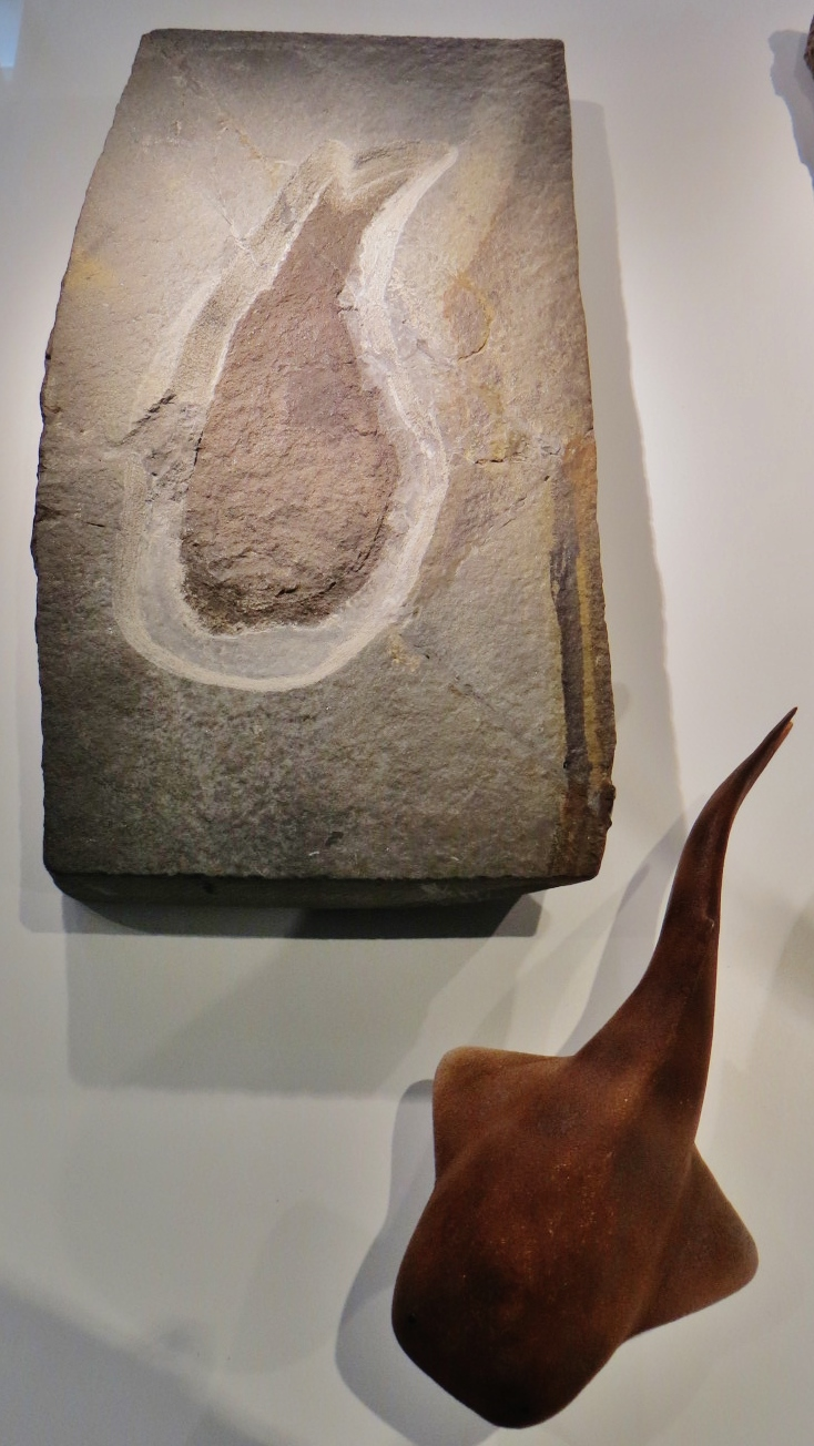 Fossil and model of Loganellia - Took the picture at Museum am Lowentor, Stuttgart